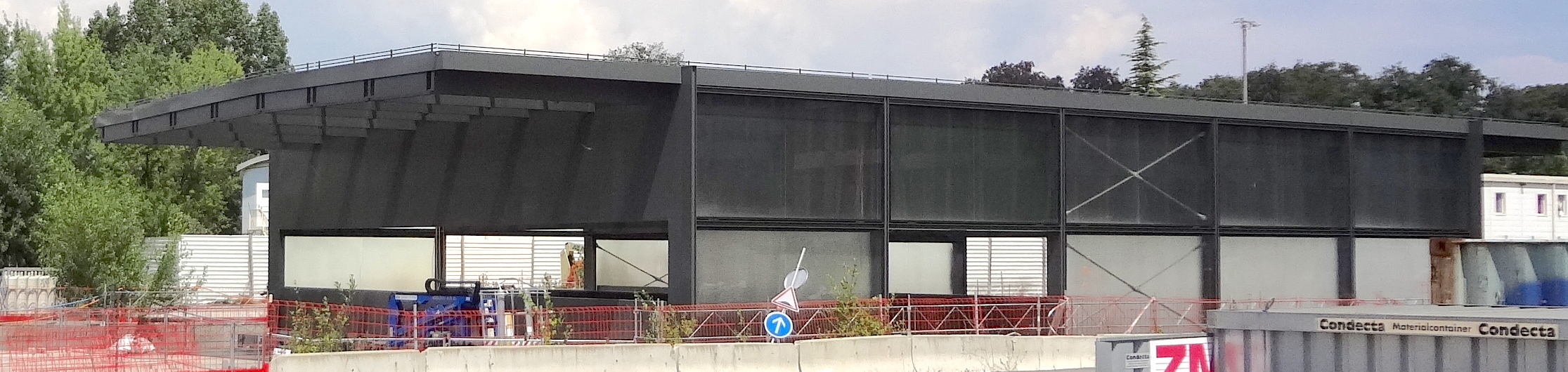 Chantier du CEVA, gare des Eaux-Vives. Émergence Franck-Thomas.